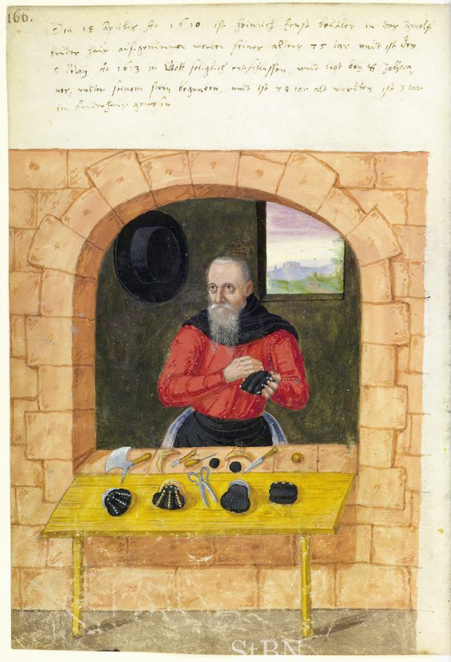 Transkription und weitere Informationen heinrich (Heinrich) Ernst, beutler (Beutler)